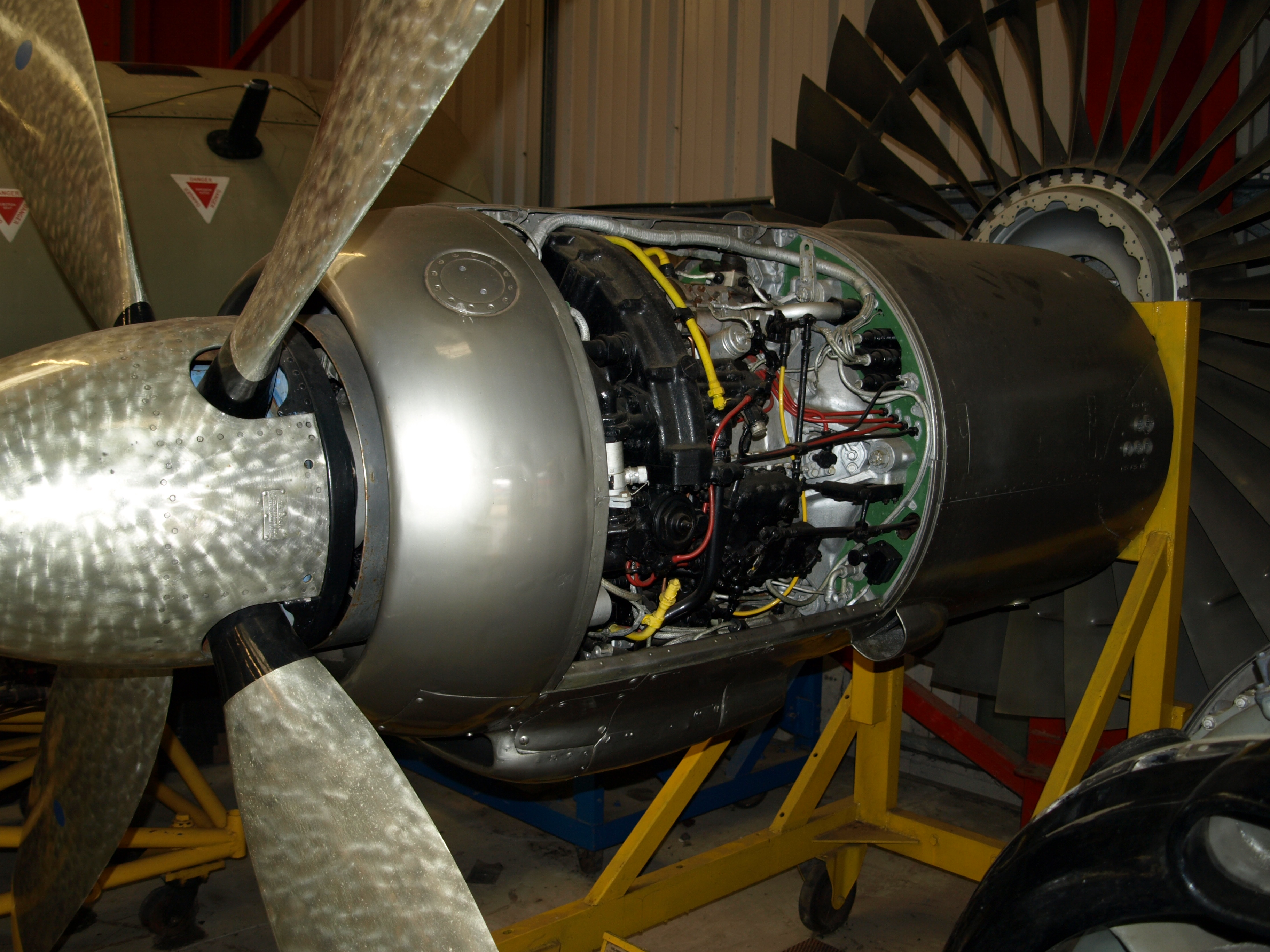 Mamba aircraft engine